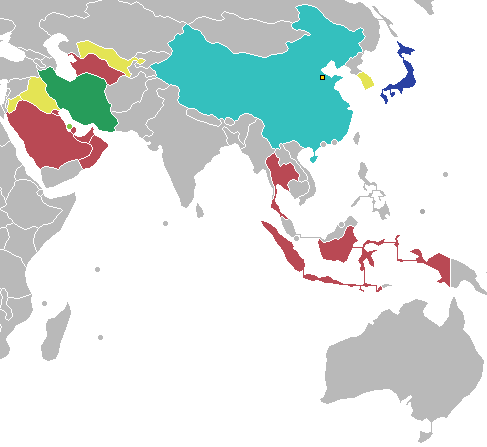 Mapa de la competición